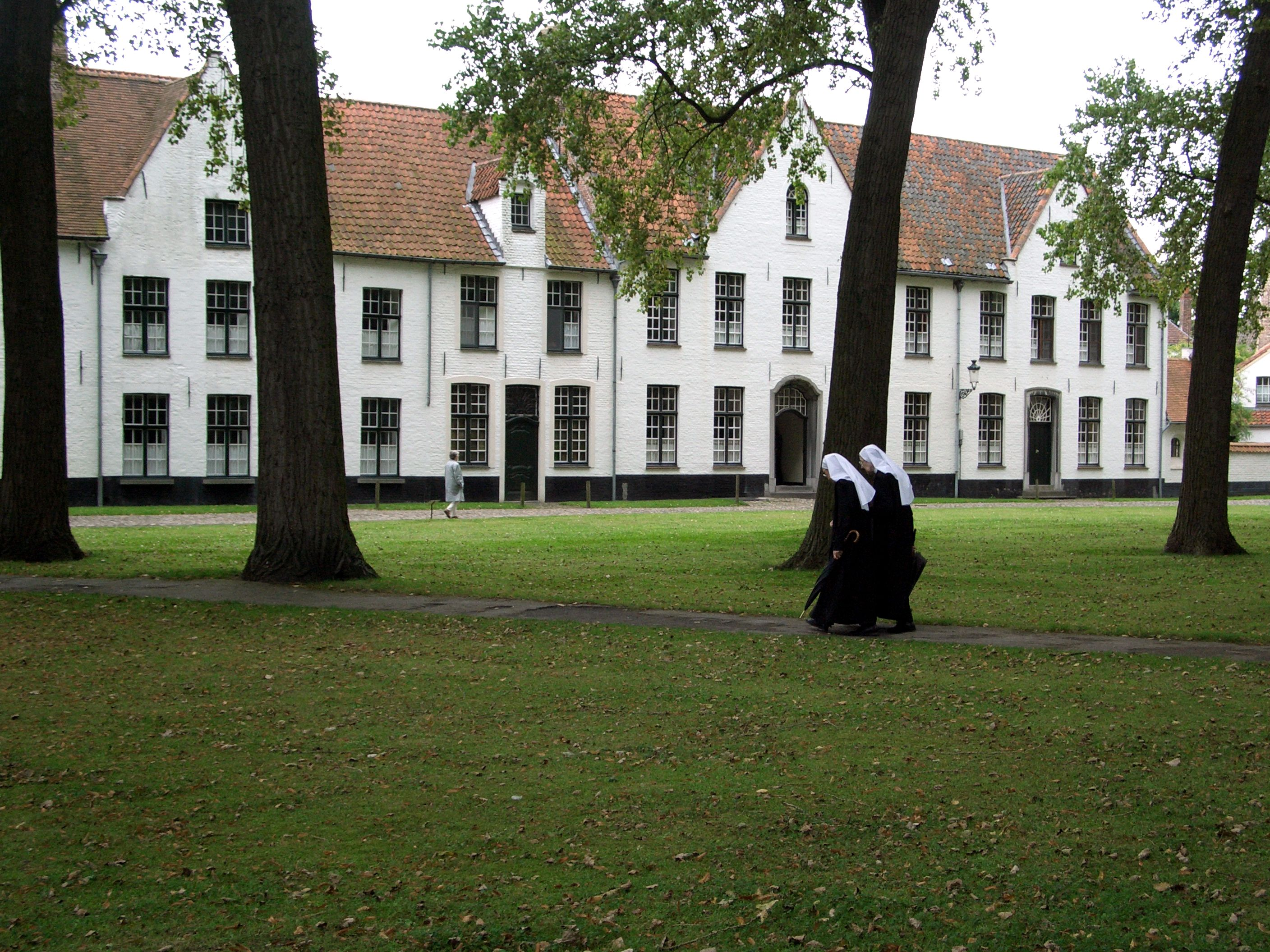 Béguinage de Bruges, côté ouest de l'enclos central. On aperçoit à gauche le pignon de la maison n°24, à droite les deux pignons de la maison n°22 (appartenant à un seul et même corps de bâtiment), et au centre-gauche une maison plus étroite dotée d'une petite lucarne, portant également le n°22.